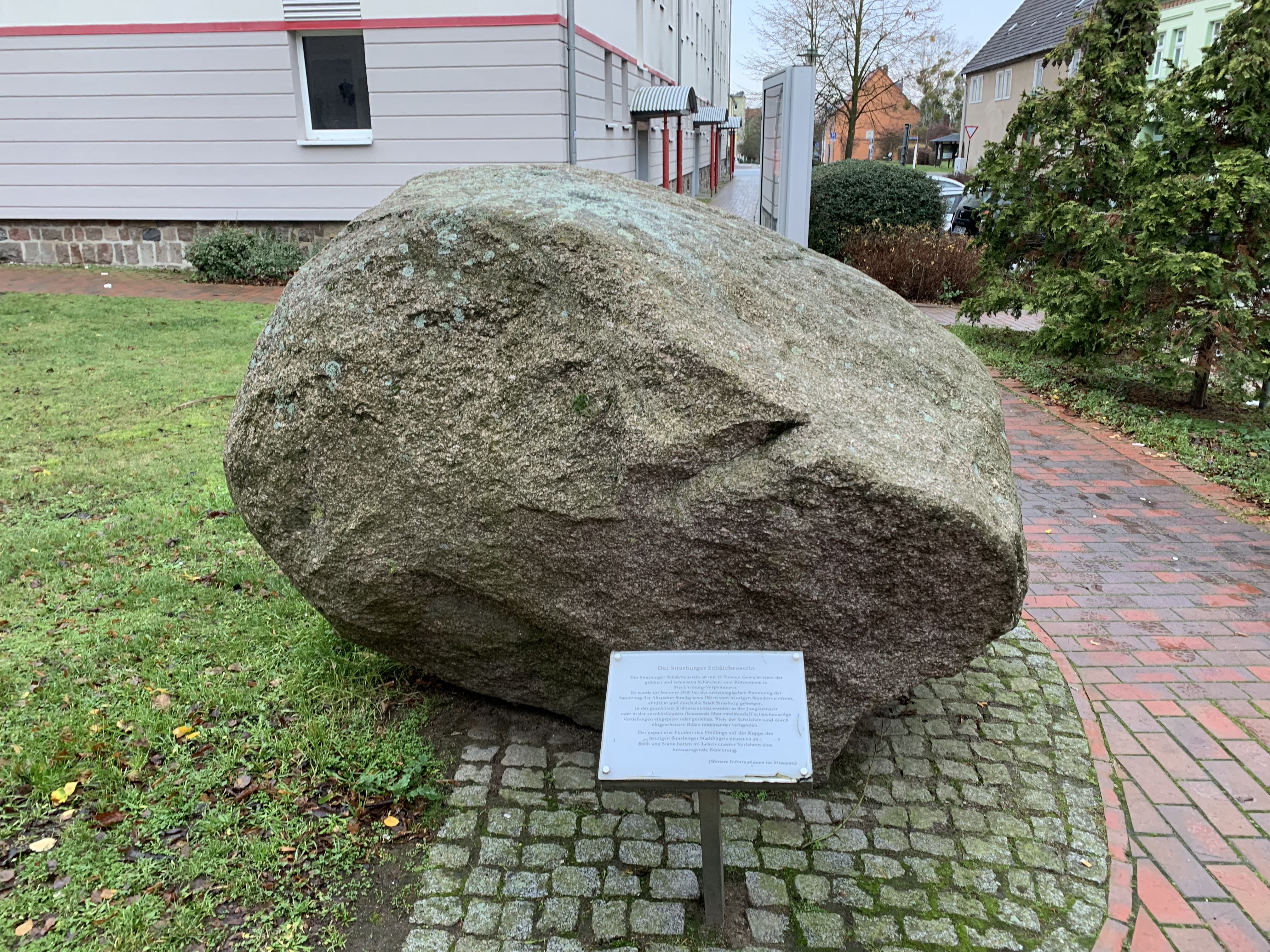 Heimatmuseum und Schälchenstein in Strasburg (Uckermark) in Mecklenburg-Vorpommern